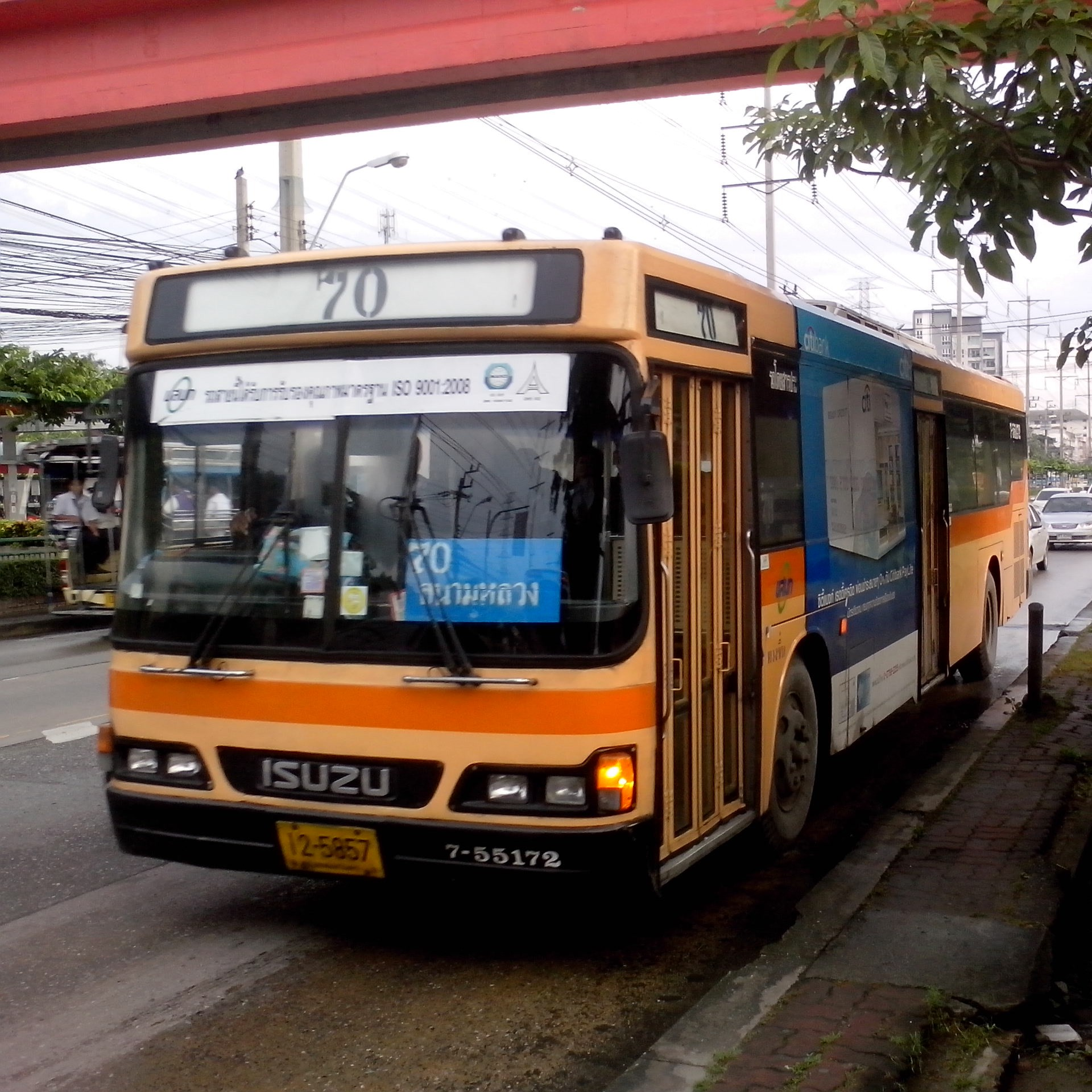 Isuzu bus no.7-55172